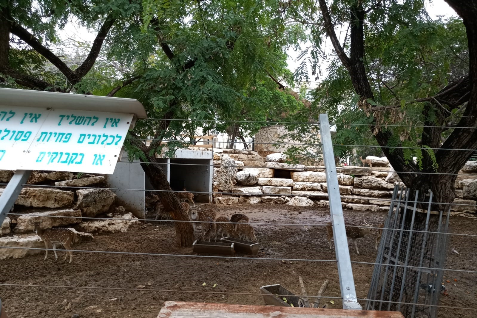 גן החי בפתח תקווה